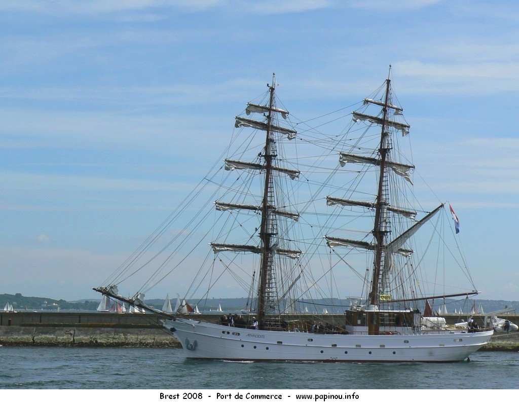 L'Apphrodite, brick hollandais construit en 1994